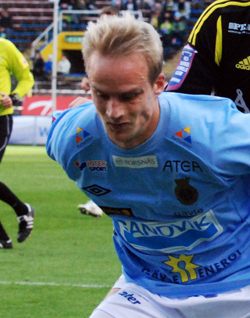 Gefle IF player Pär Asp.